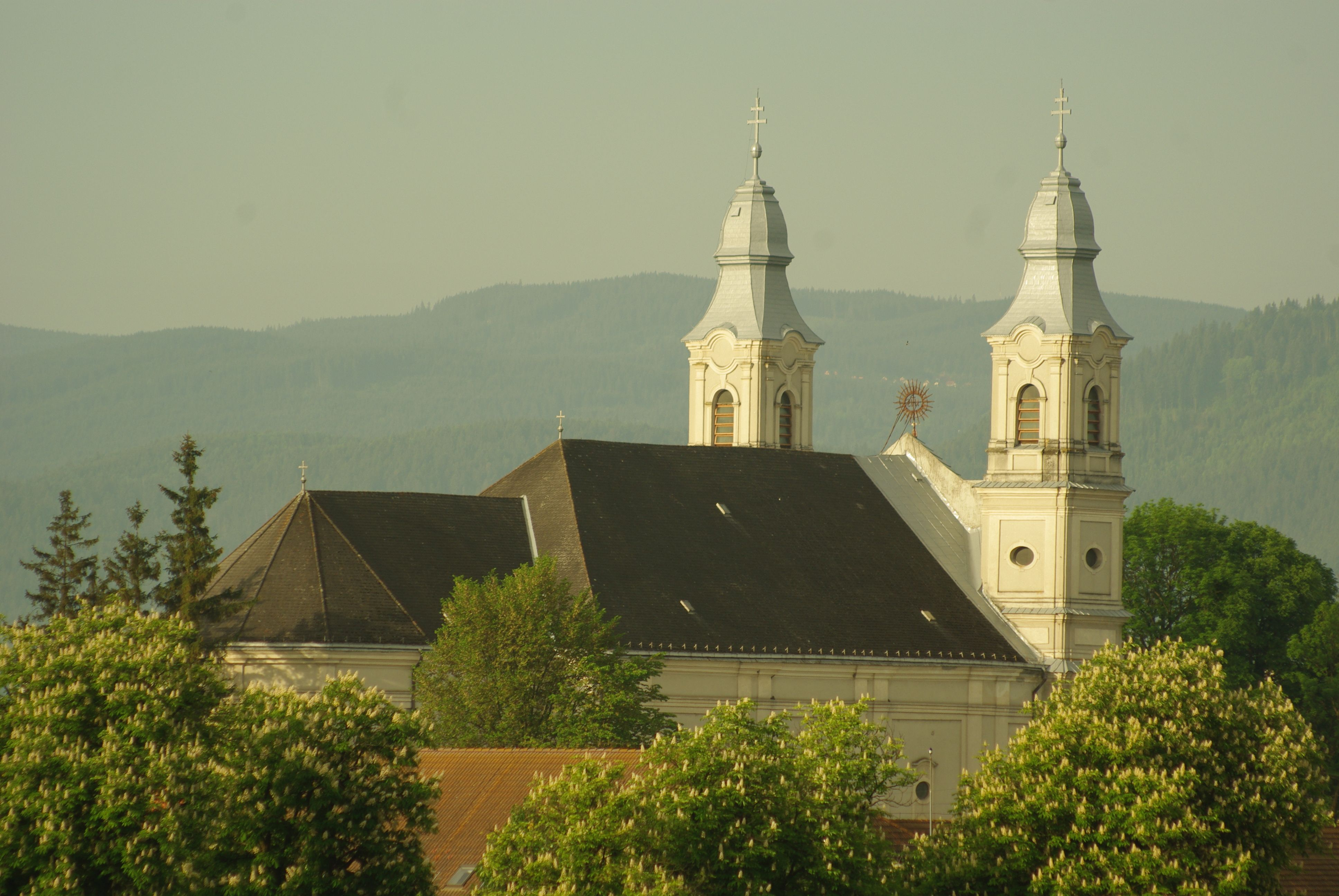 Biserica mănăstirii franciscane „Vizita Mariei la Elisabeta” cu piatra funerară încastrată 01